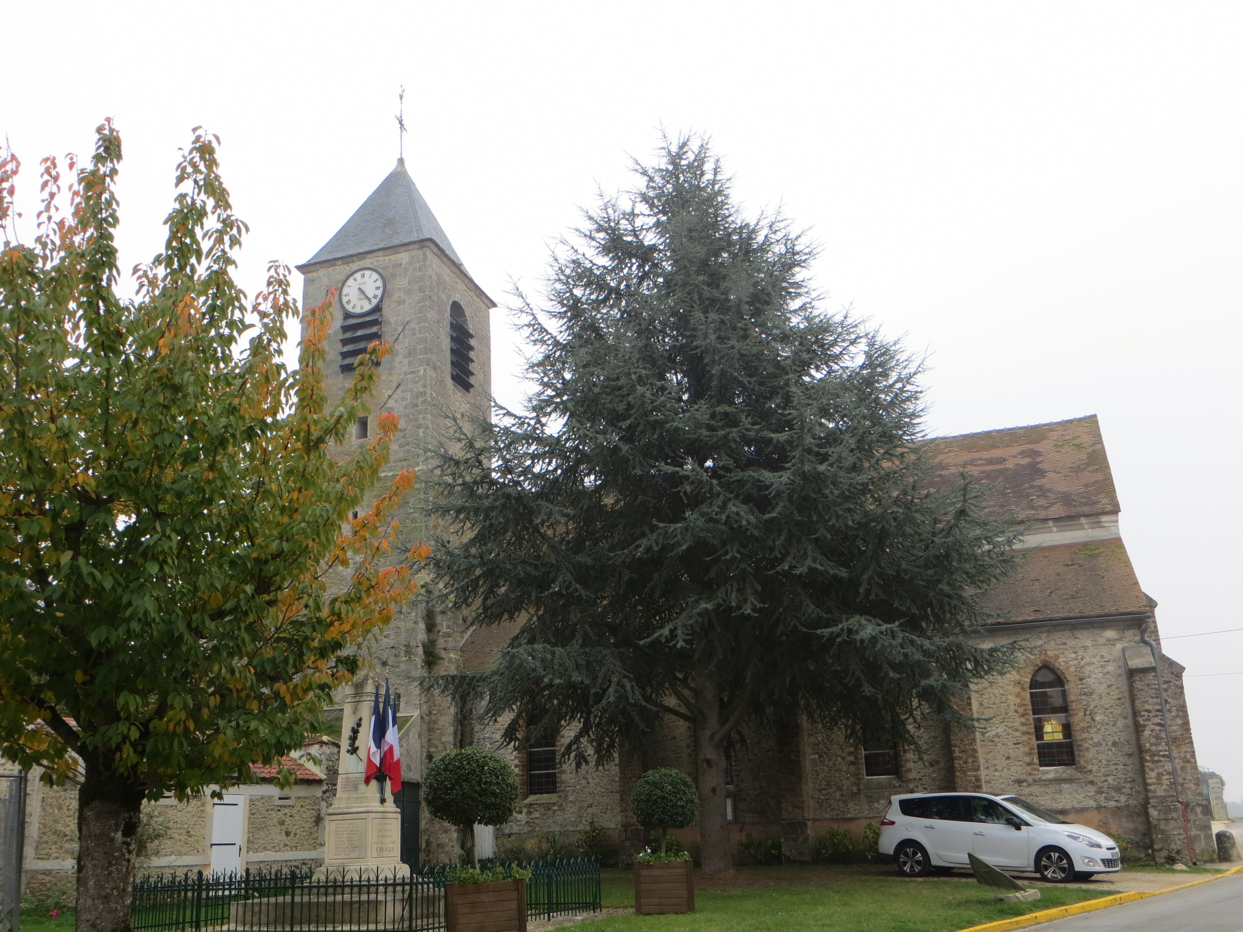 Vue générale de l'église